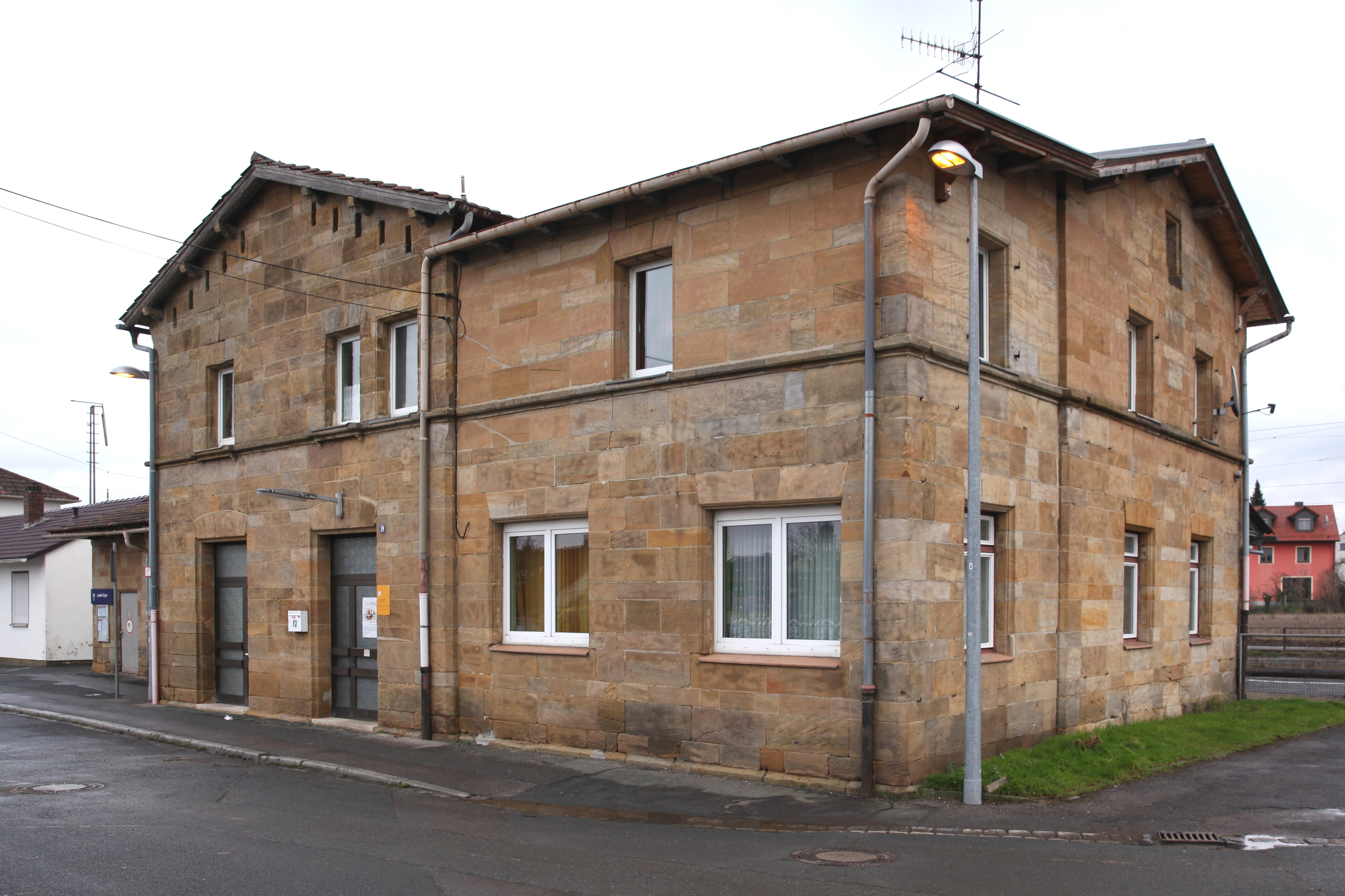 Bahnhof, Breitengüßbach